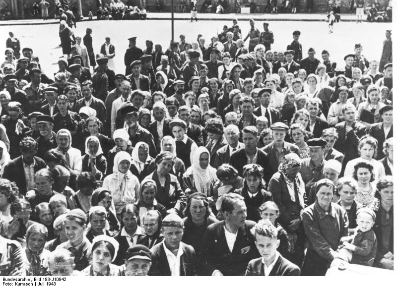 Gruppe von Ostarbeitern vor Fahrt nach Deutschland Freiwillige Ostarbeiter fahren nach Deutschland Arbeitswillige und Angehörige lauschen den Worten des Bürgermeisters. Kriegsber. Kurrasch, 30. Juli 1943 [Herausgabedatum]